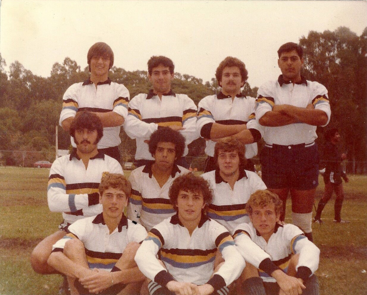 Grupo de chicos del equipo de rugby del CASA de Padua, San Antonio de Padua, Merlo, Argentina. Nombres: Walter Lang, Oblac, Carlos Teodori, Daniel Saraceni, Fabián Gandolfi, Sergio Sebastián, Marcelo Mattio, Mariano, Paul Capello y Alejandro Rienda. 1982